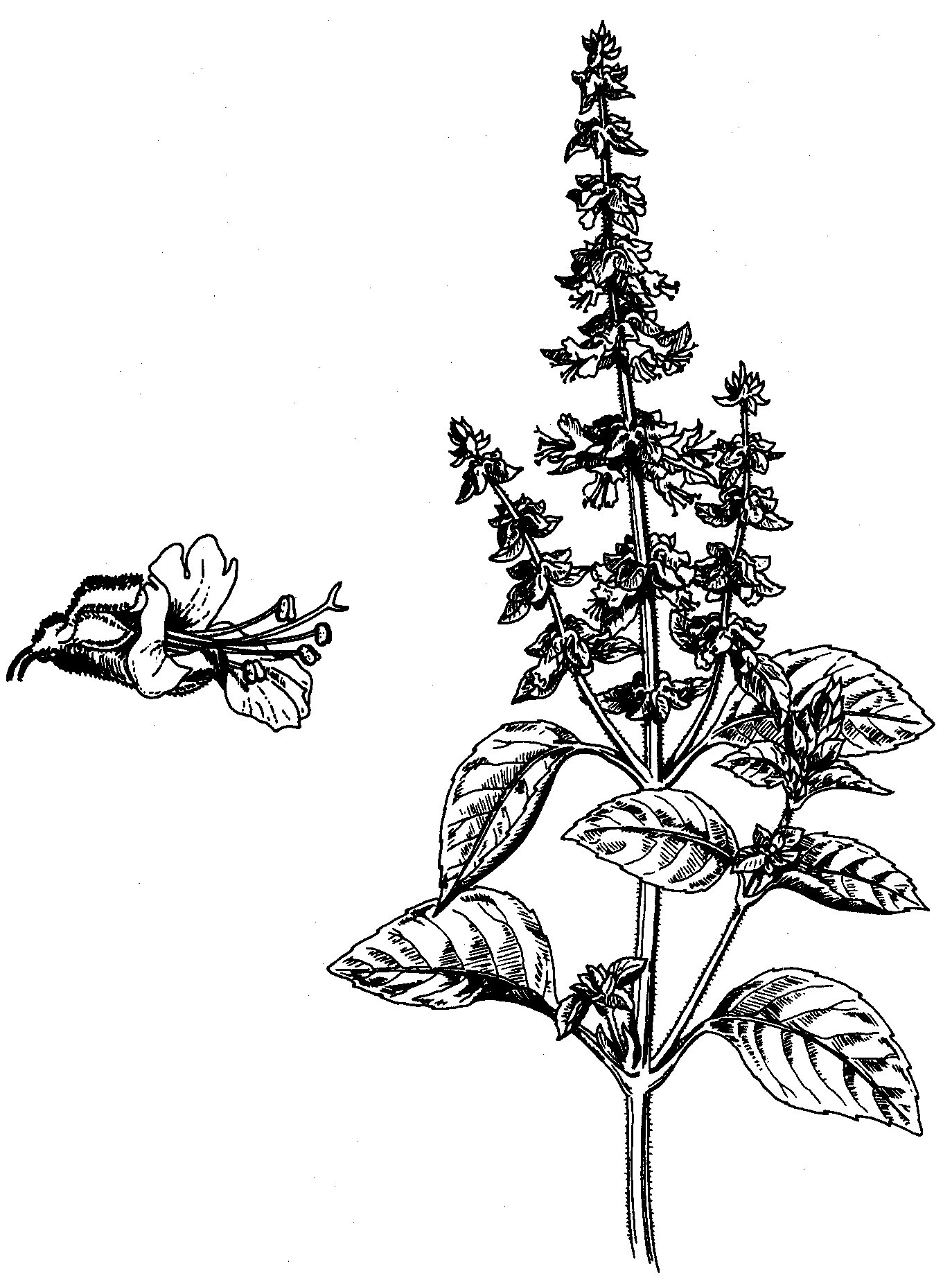 schéma de l'Ocimum basilicum